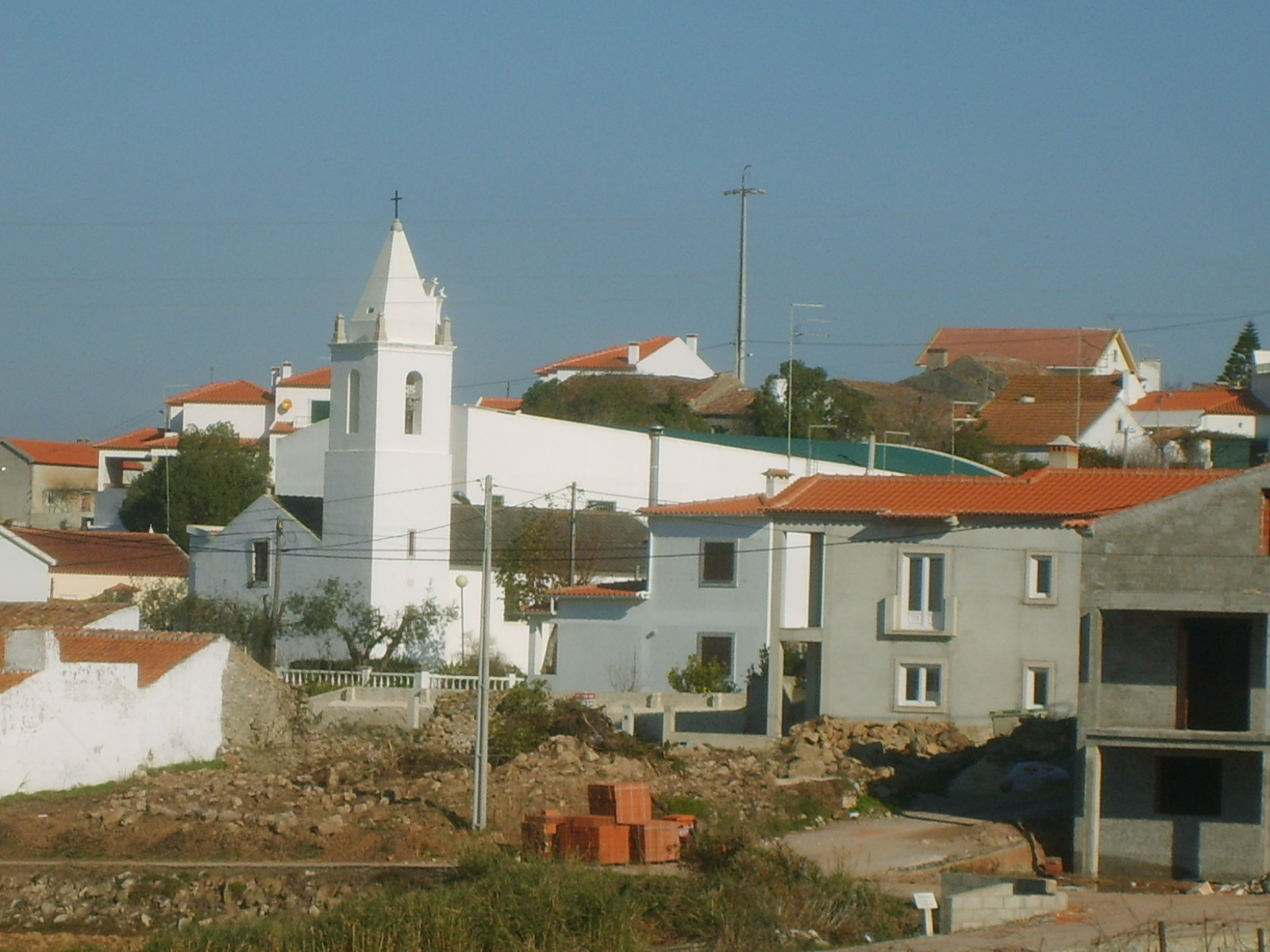 Igreja de São Bartolomeu dos Galegos